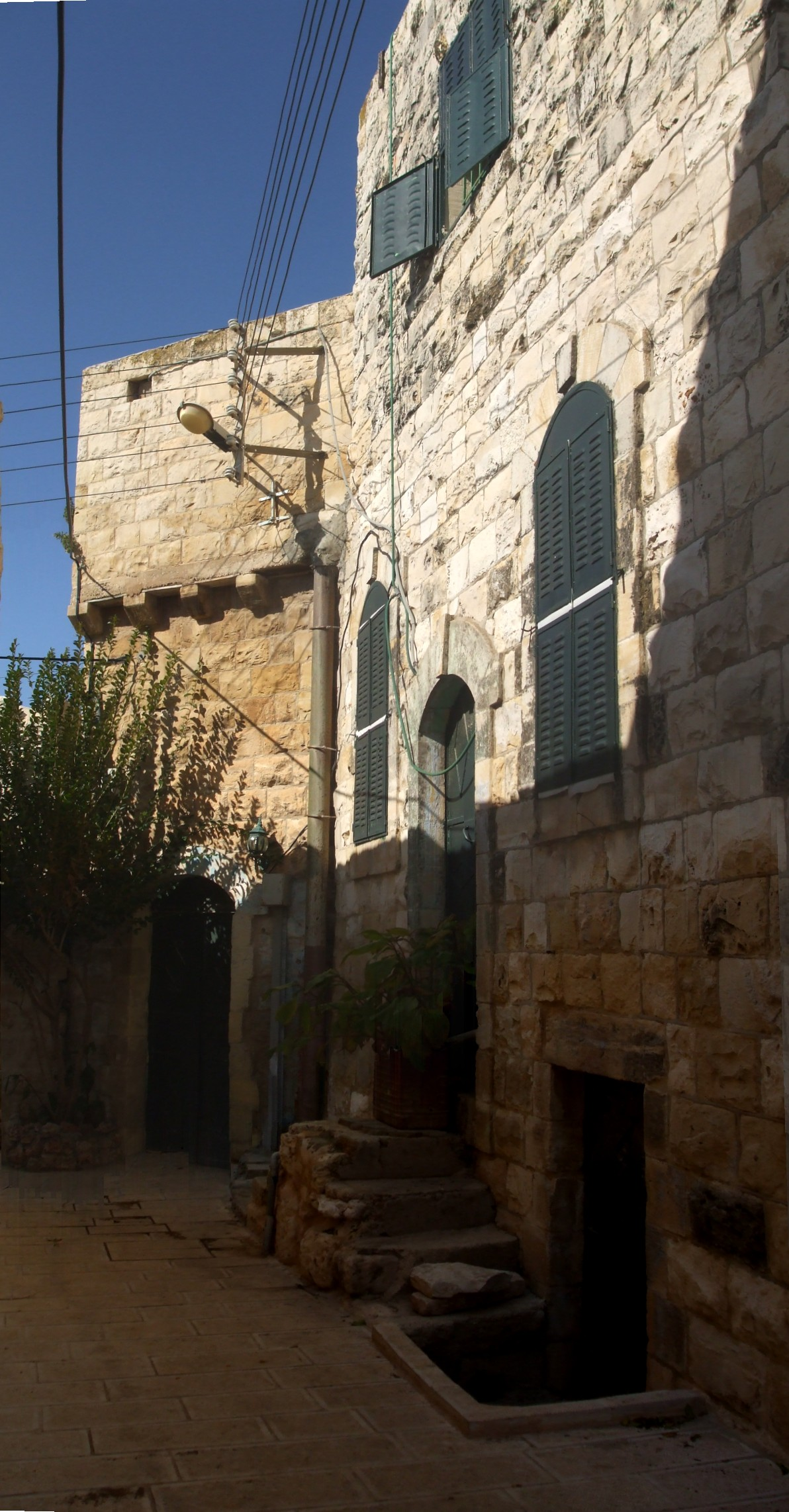 البلدة القديمة